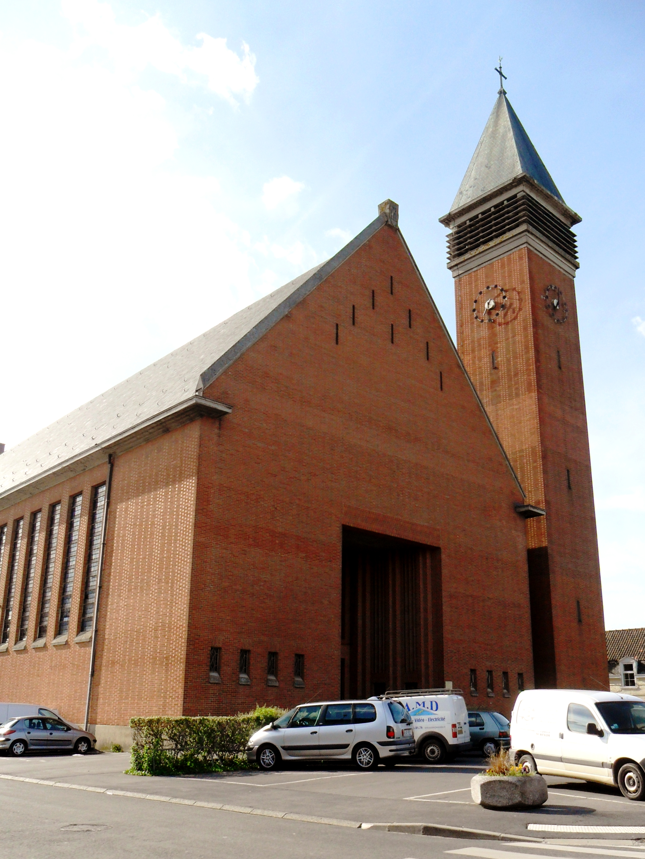 Hazebrouck